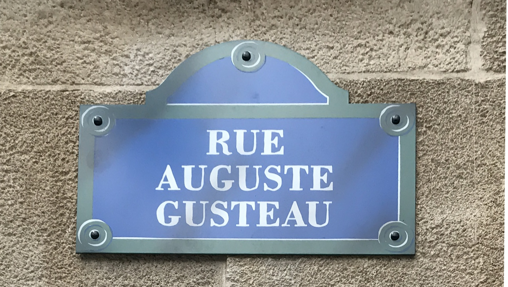 Disney Land Paris en 2017 : fausse plaque de rue Auguste-Gusteau dans l'univers "Ratatouille: The Adventure".